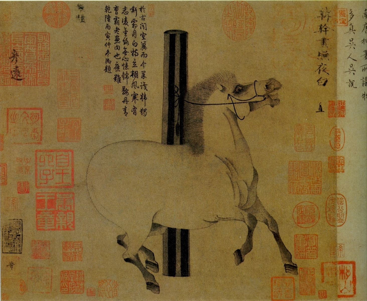 Хань Гань. Молния в ночи. ок. 750г Метрополитен